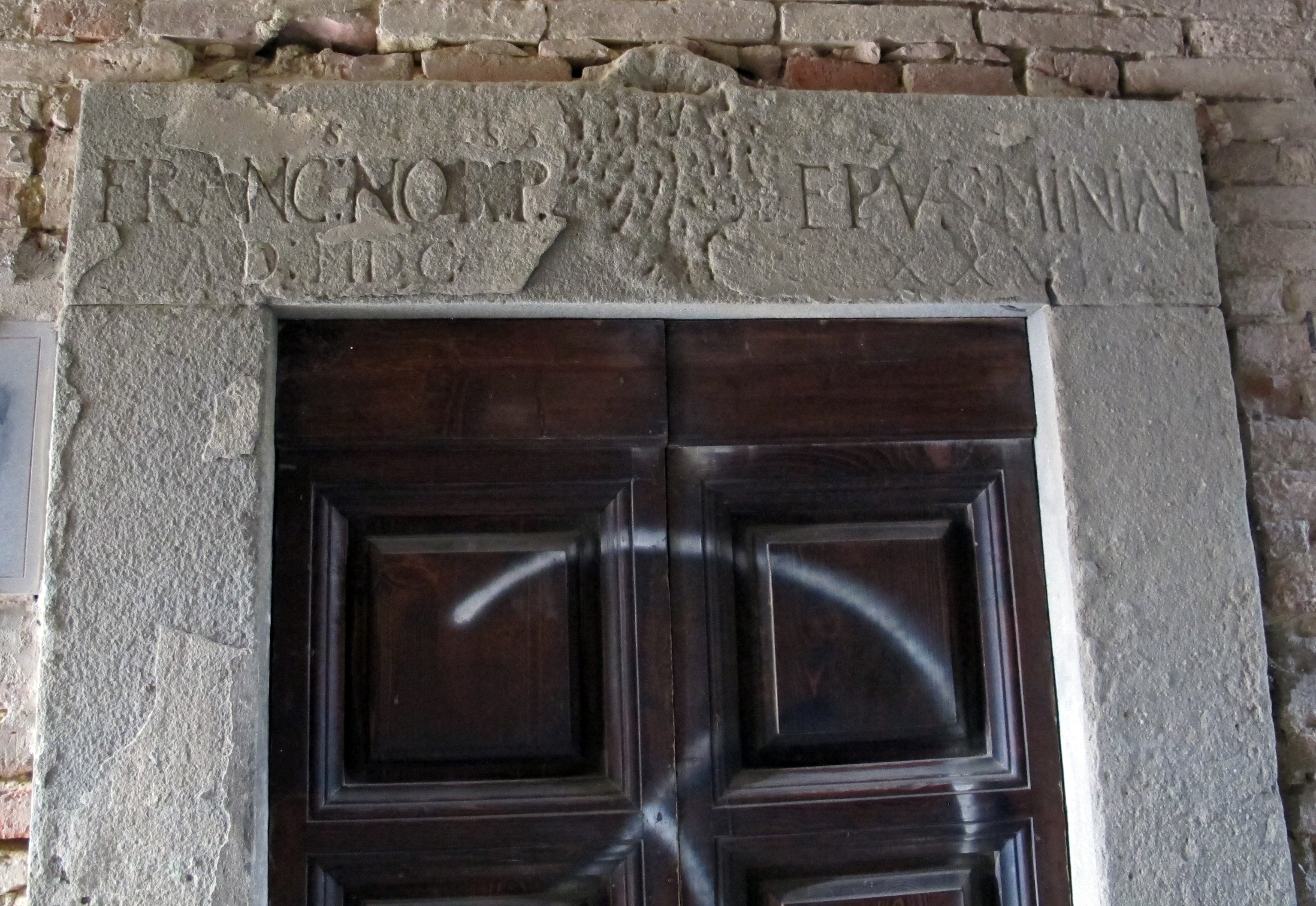 Palazzi di San Miniato